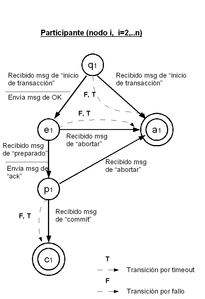 Gráfico de proceso del commit en tres fases (nodo participante)